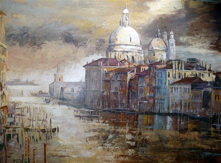 Foto de la obra pictorica de Paco Campos titulada Gran Canal